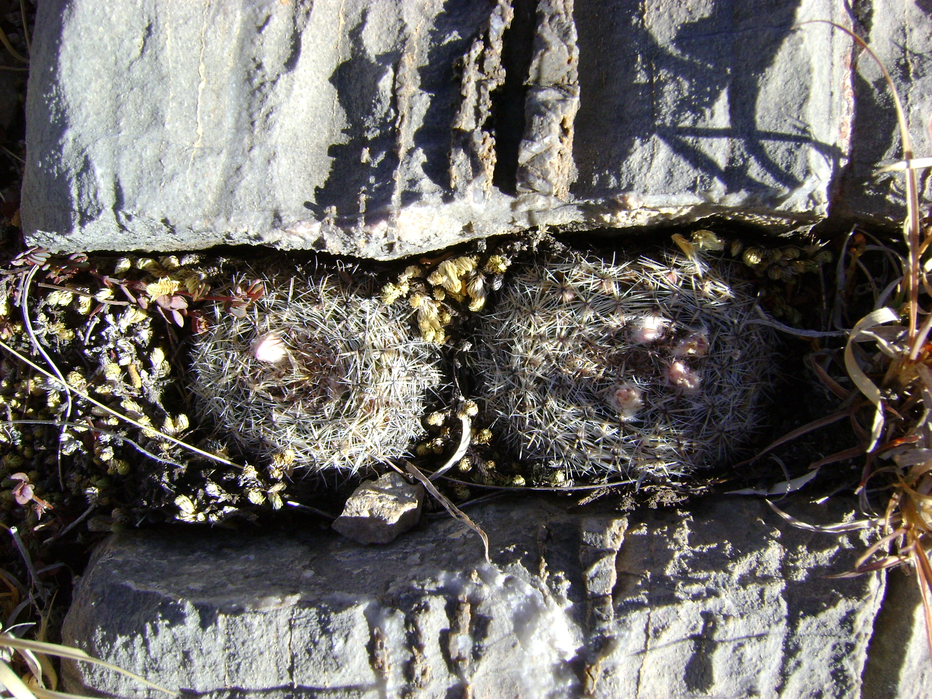 Mammillaria formosa - Doctor Arroyo, Nuevo Leon